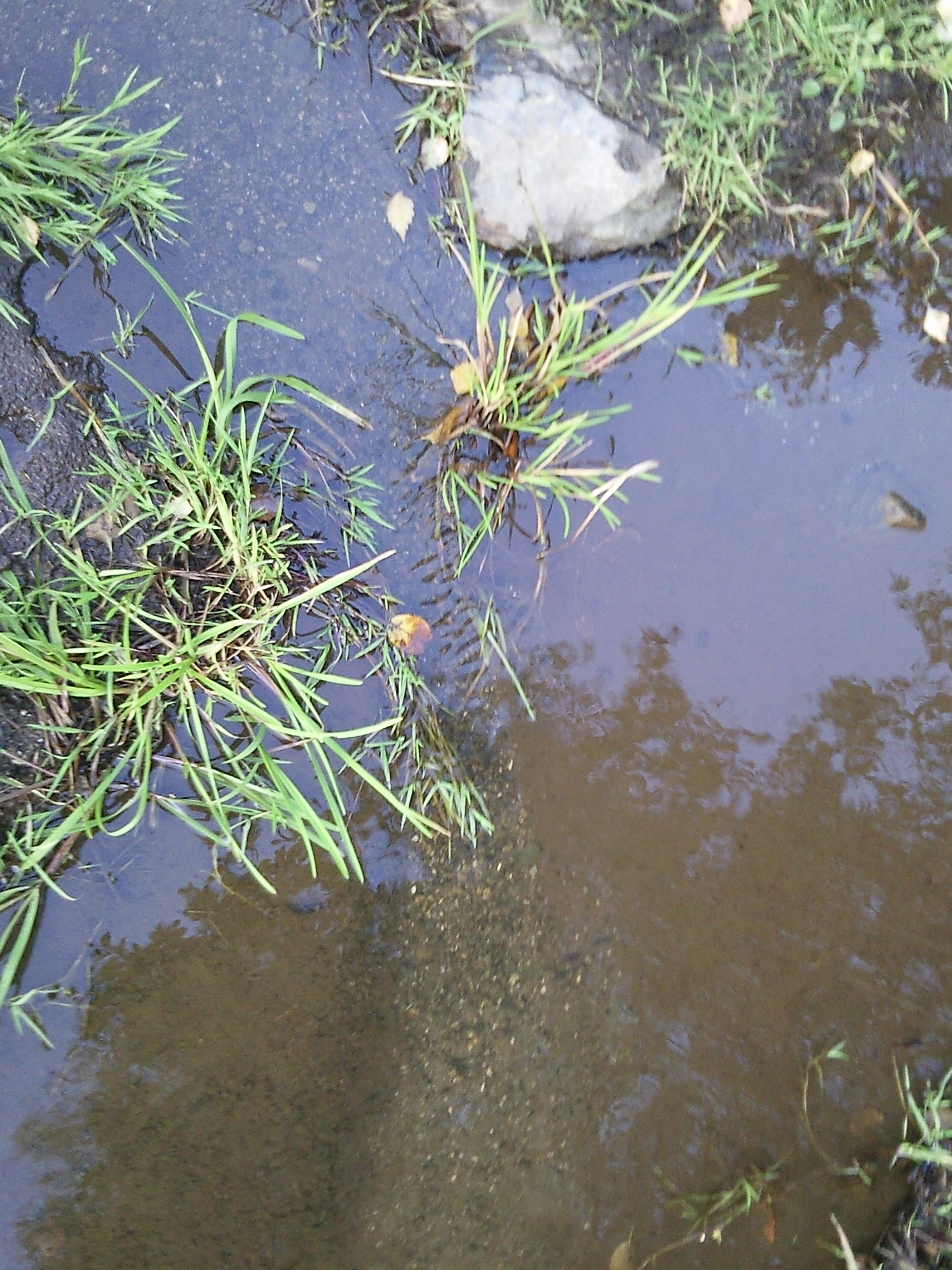 Zufluß des Büschengraben an der Spitzer Furth